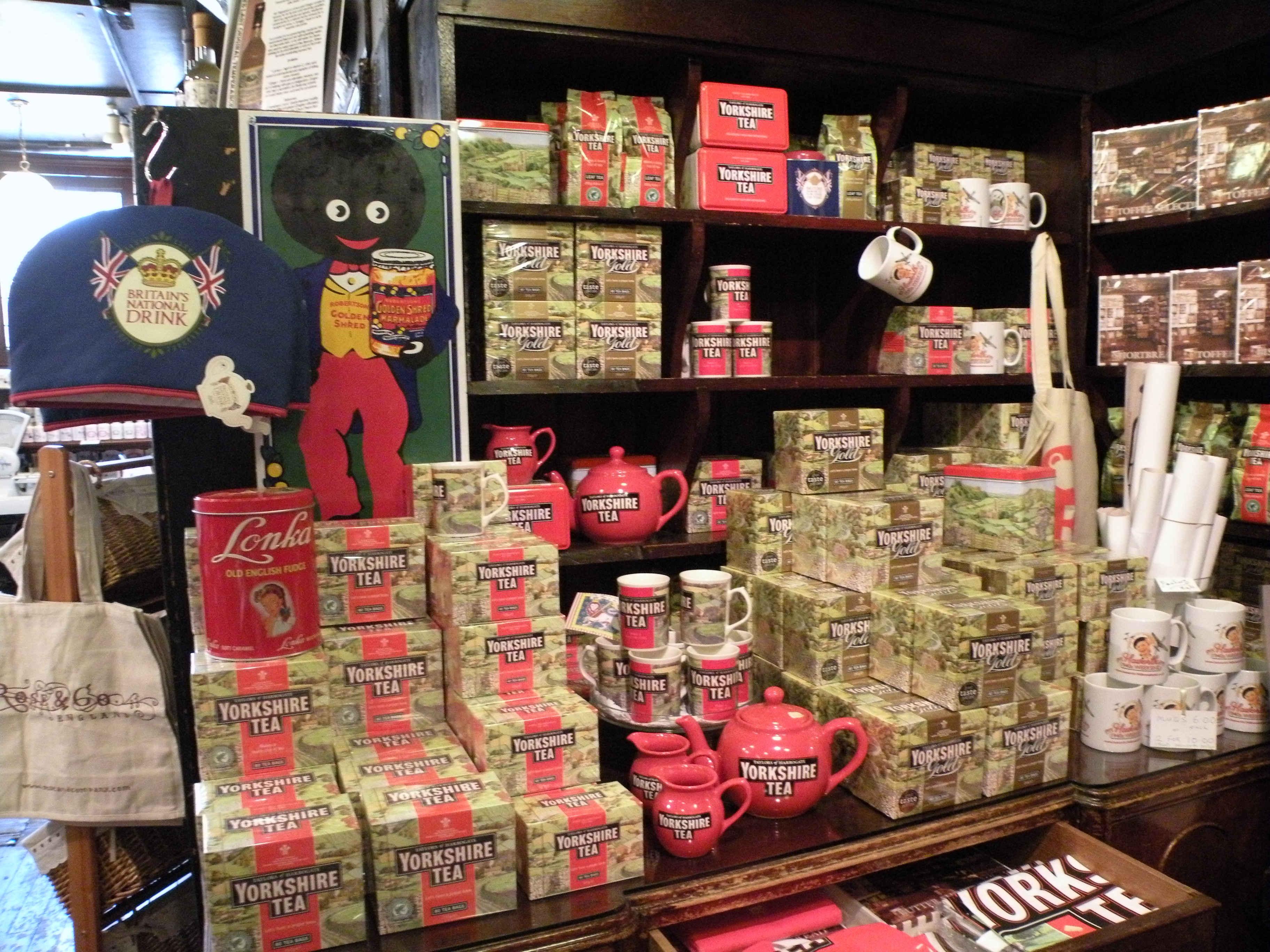 Haworth, Rose & Co. Apothecary interieurfoto